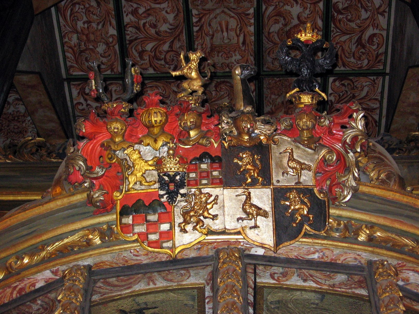 Świdnica, pl. Pokoju - Kościół Pokoju (zabytek nr rejestr. A/1677/131 2.01.1950)